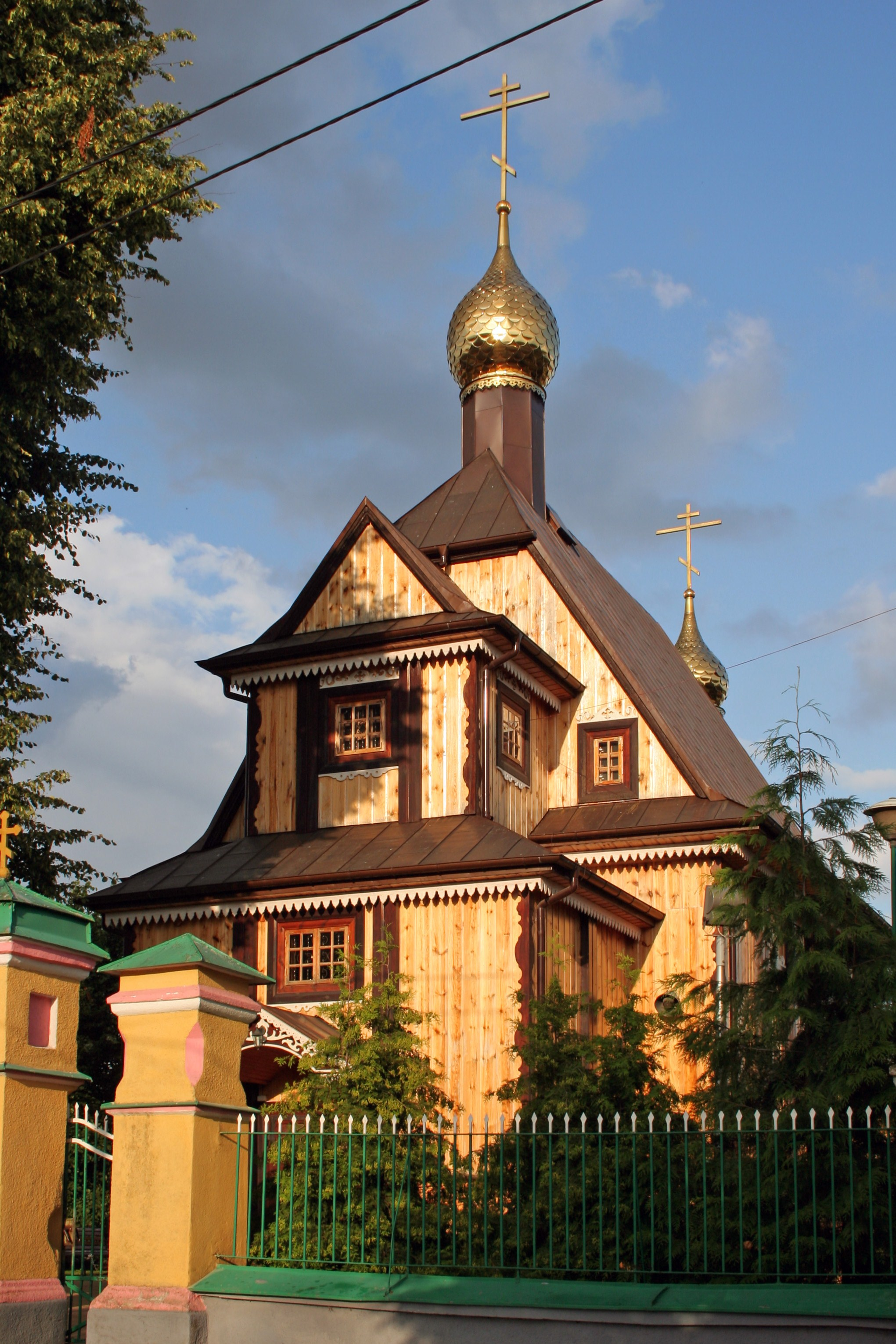 Cerkiew Narodzenia Bogarodzicy w Bielsku Podlaskim.